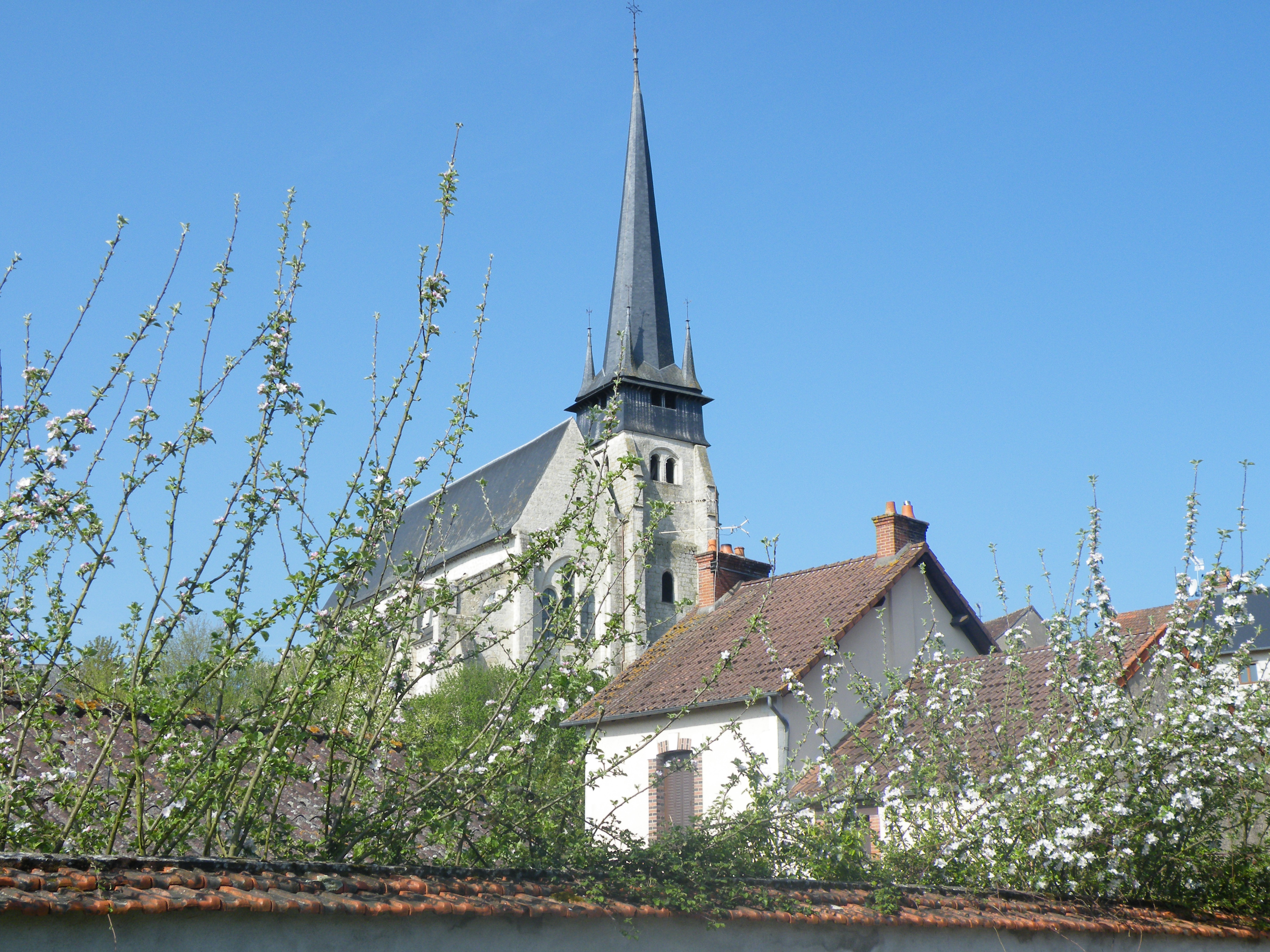 Photographie prise à Ouzouer sur Trézée - Par Yoann Ledey